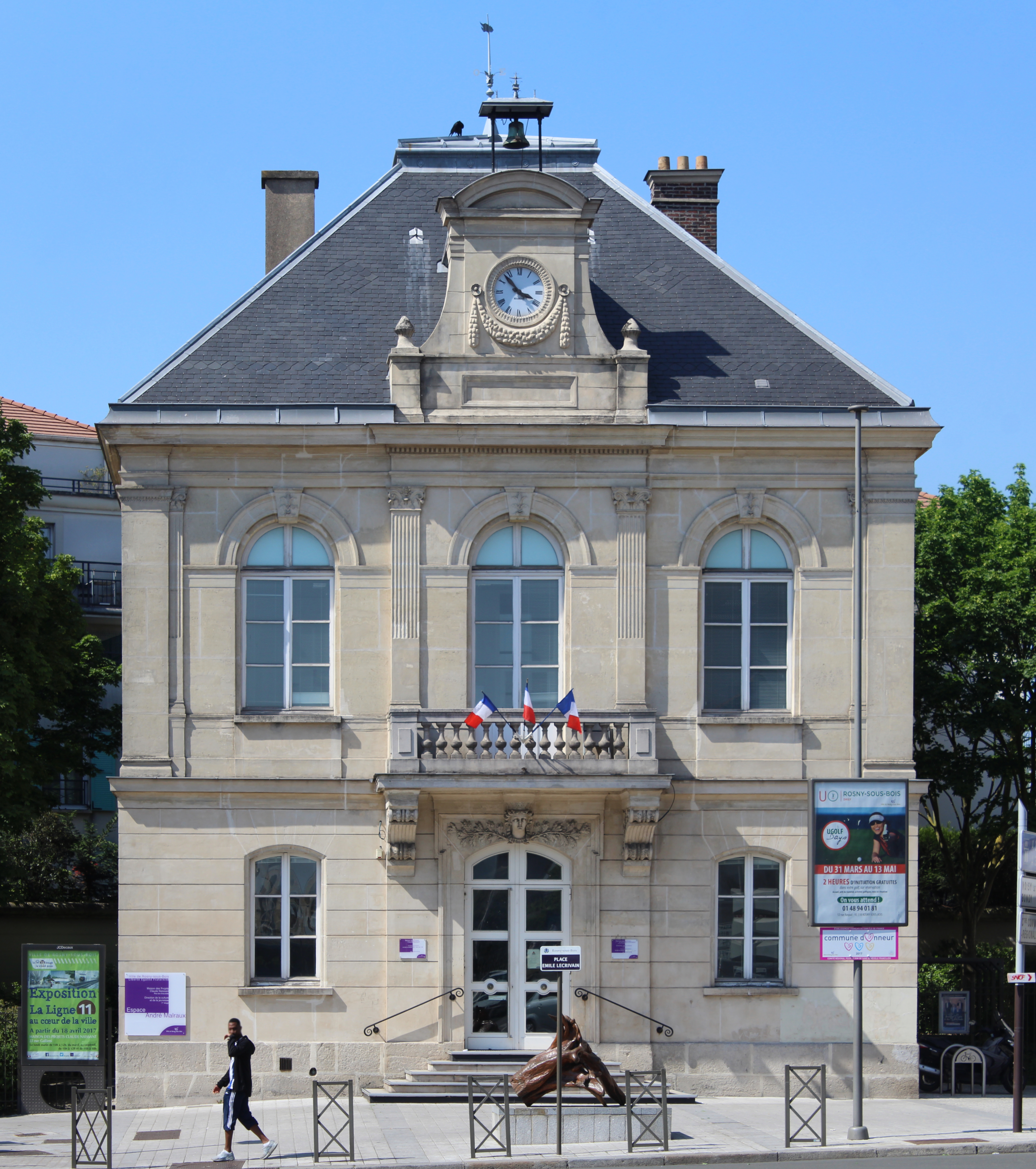 Ancienne mairie de Rosny-sous-Bois.